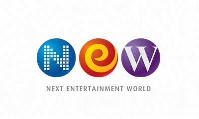 NEW